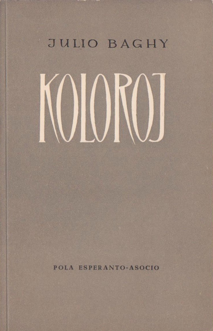 librokovrilo de "Koloroj", 1960